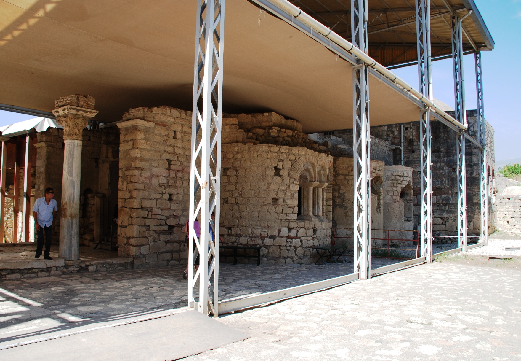 Kirche des heiligen Nikolaus von Myra